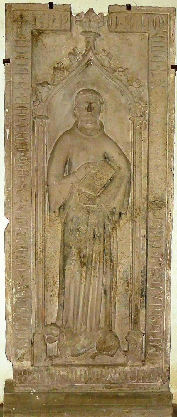 Monument funéraire du frère Conrad de Gougenheim mort en 1360